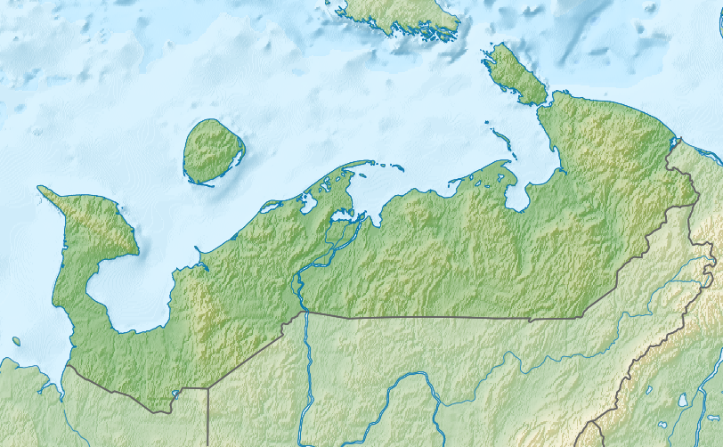 Физическая карта Ненецкой автономной области (Россия). Координаты для GMT: -R42.0/66.5/65.4/71.0 Инструменты: GMT, Inkscape